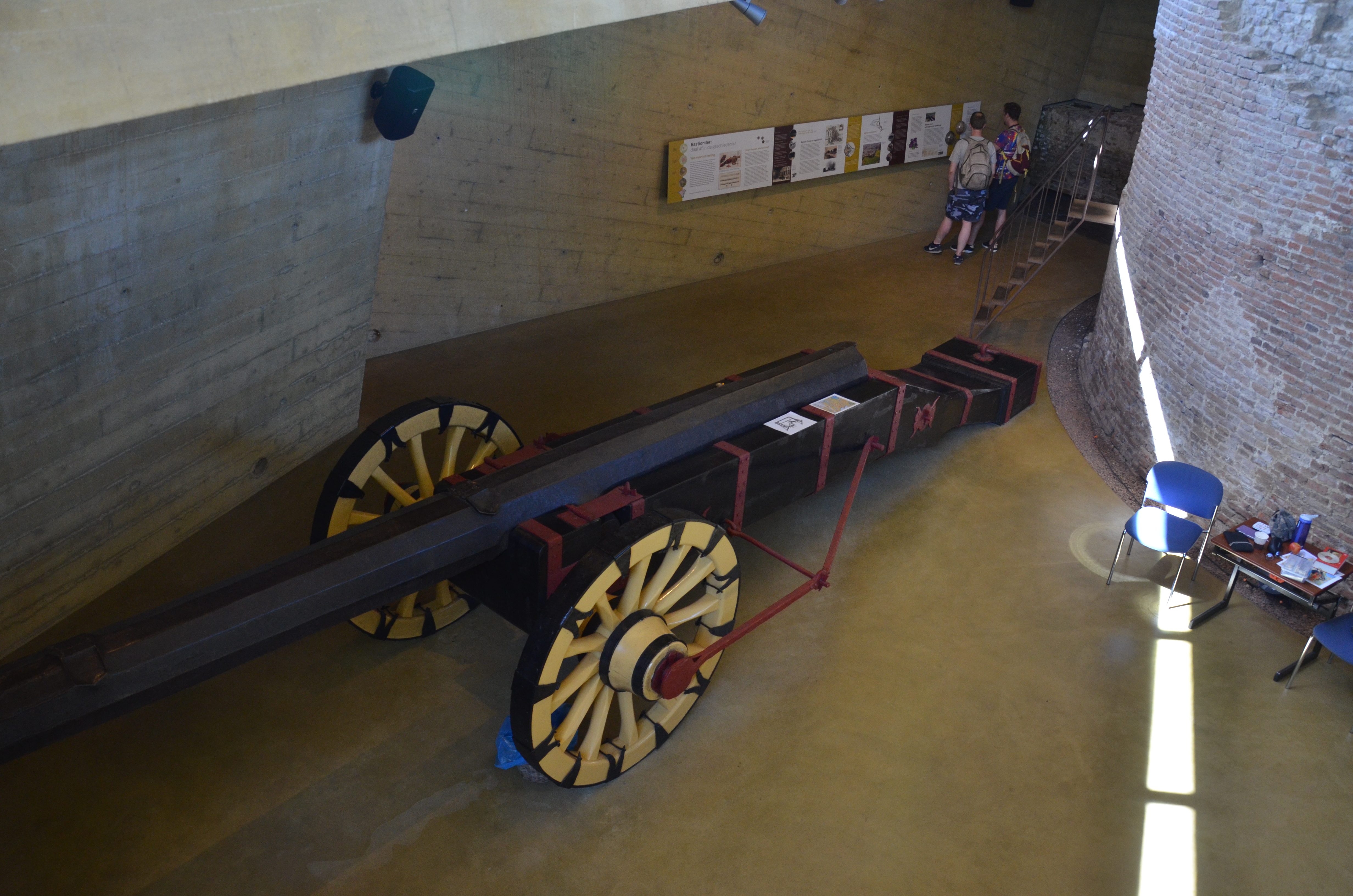 Zicht op een deel van het interieur van het Bastionder in 's-Hertogenbosch.